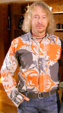 Músico brasileiro Marcos Valle em imagem do acervo da TV Brasil.